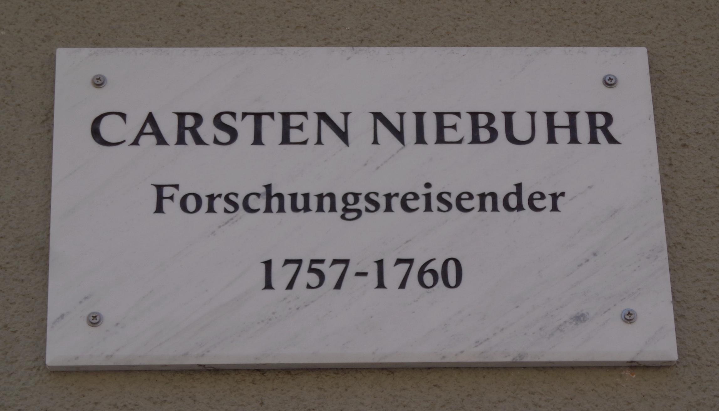 "Göttinger Gedenktafel" für Carsten Niebuhr (Groner Straße 11)